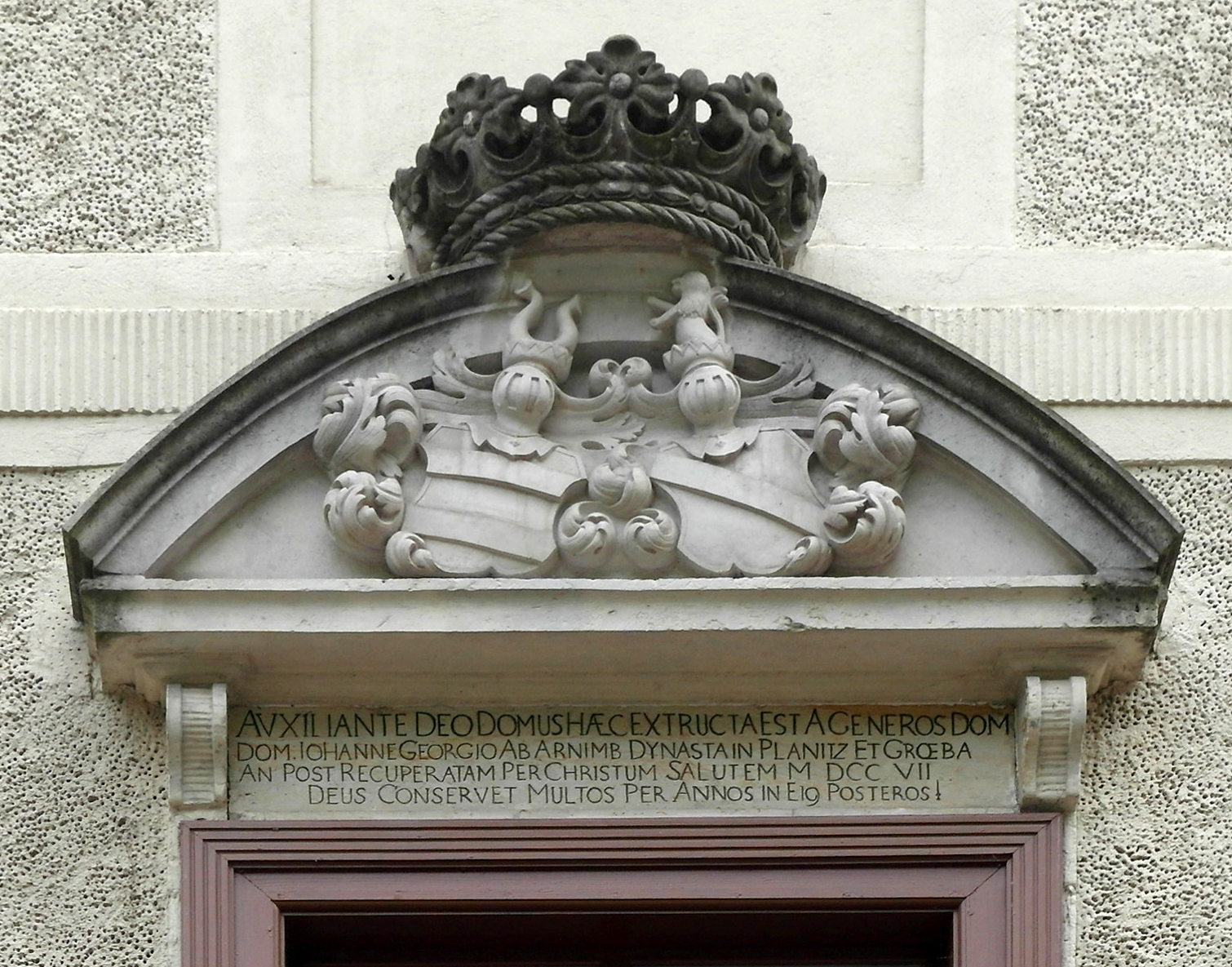 12.05.2017 01591 Gröba (Riesa), Kirchstraße 46 (GMP: 51.320693,13.289074): Schloß Gröba, 1707 für Johann Georg von Arnim und seine Frau errichtet. 1949-1975 Altersheim, dann Leerstand. Ab 1983 Rat des Kreises Riesa / Landratsamt. 2001 privat verpachtet. Nach dem EIbehochwasser 2002 zog sich der Pächter wieder aus Gröba zurück. Seit 2012 nutzt ein Pflegedienst das Schloß für betreutes Wohnen. Die Wappen der Familien von Arnim und Nitzschwitz im Bogenfeld über dem hofseitigen Fenster im 1. Obergeschoß erinnern an den Bauherrn und seine Ehefrau. [SAM9878.JPG]20170512705DR.JPG(c)Blobelt